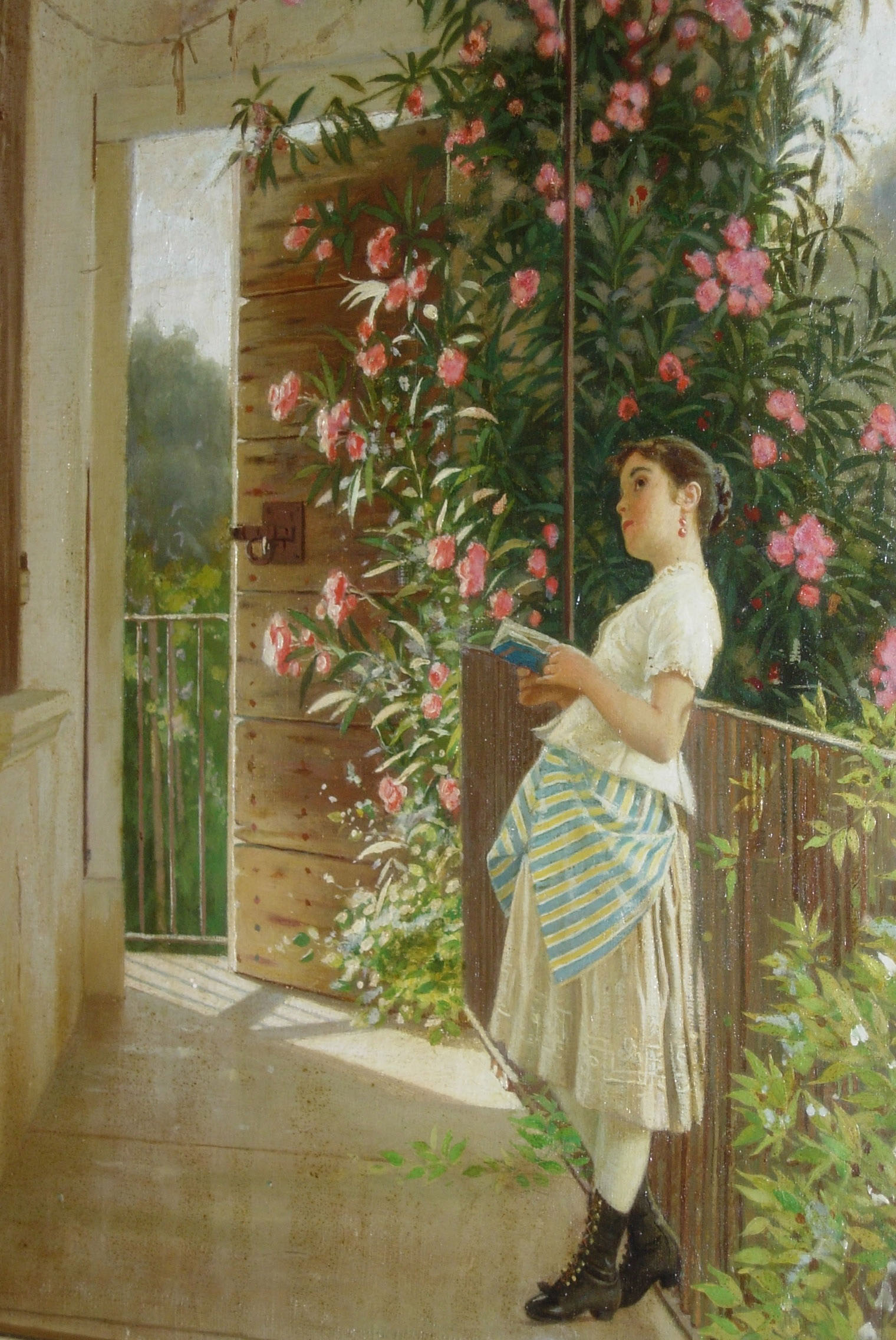 Andrea Fossati